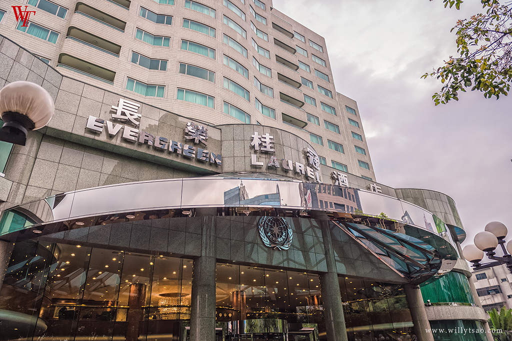 長榮桂冠酒店（台中），位於臺灣臺中市西屯區臺灣大道二段666號。